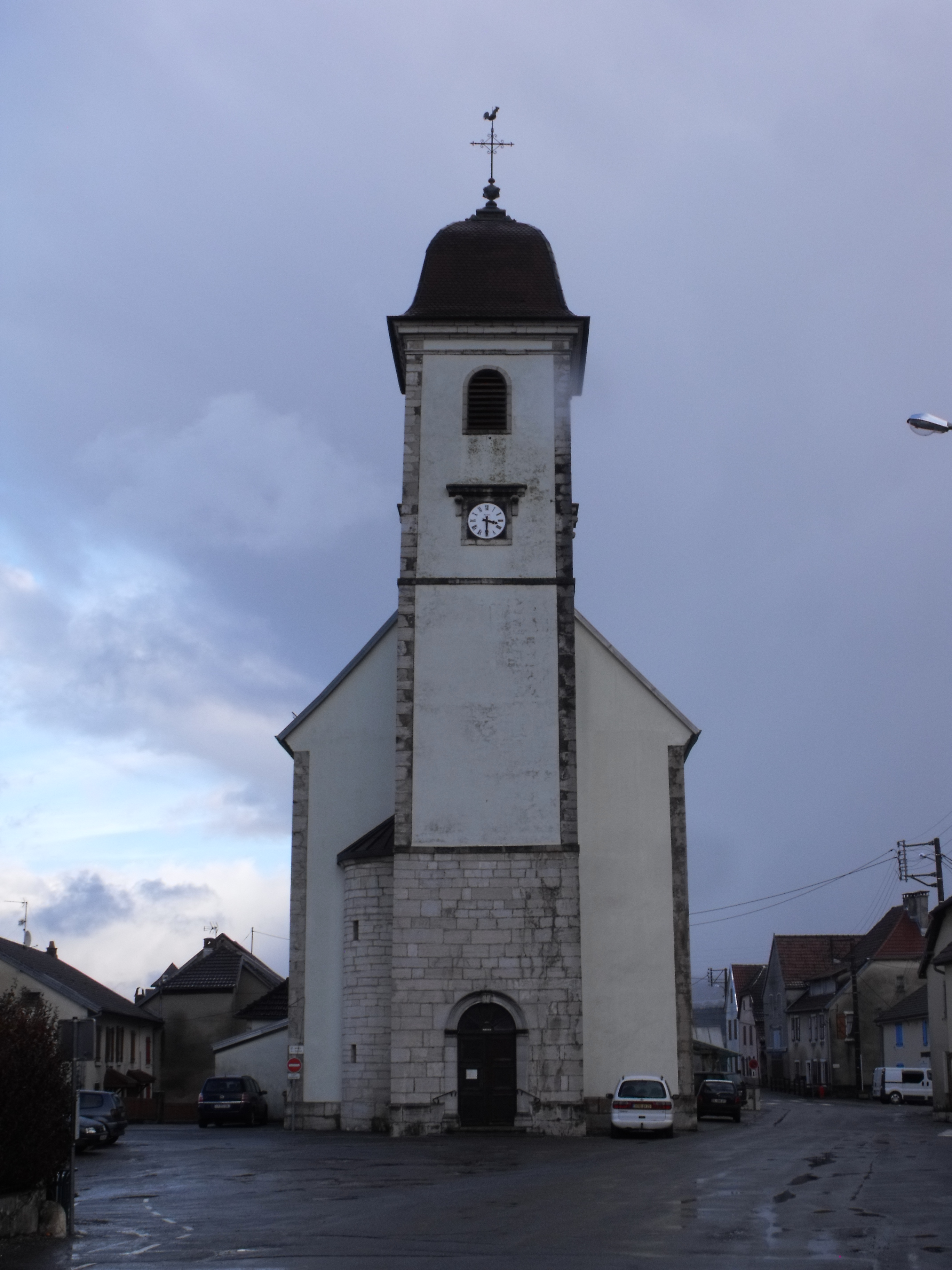 Eglise de Blamont, Doubs, France